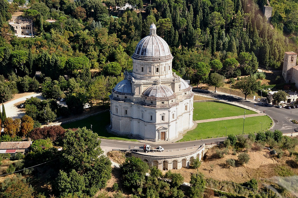 Tempio di Santa Maria della Consolazione This is a photo of a monument which is part of cultural heritage of Italy.